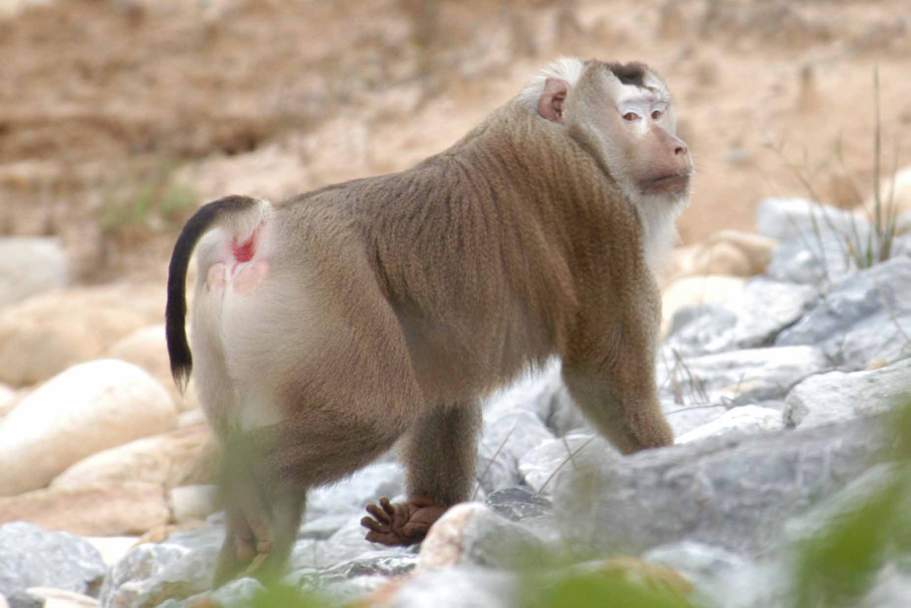 Macaca leonina (Macaca nemestrina leonina). Macaque à queue de cochon du Nord mâle dans le parc national du Khao Yai en Thaïlande. Photo Blaise Droz, mai 2004